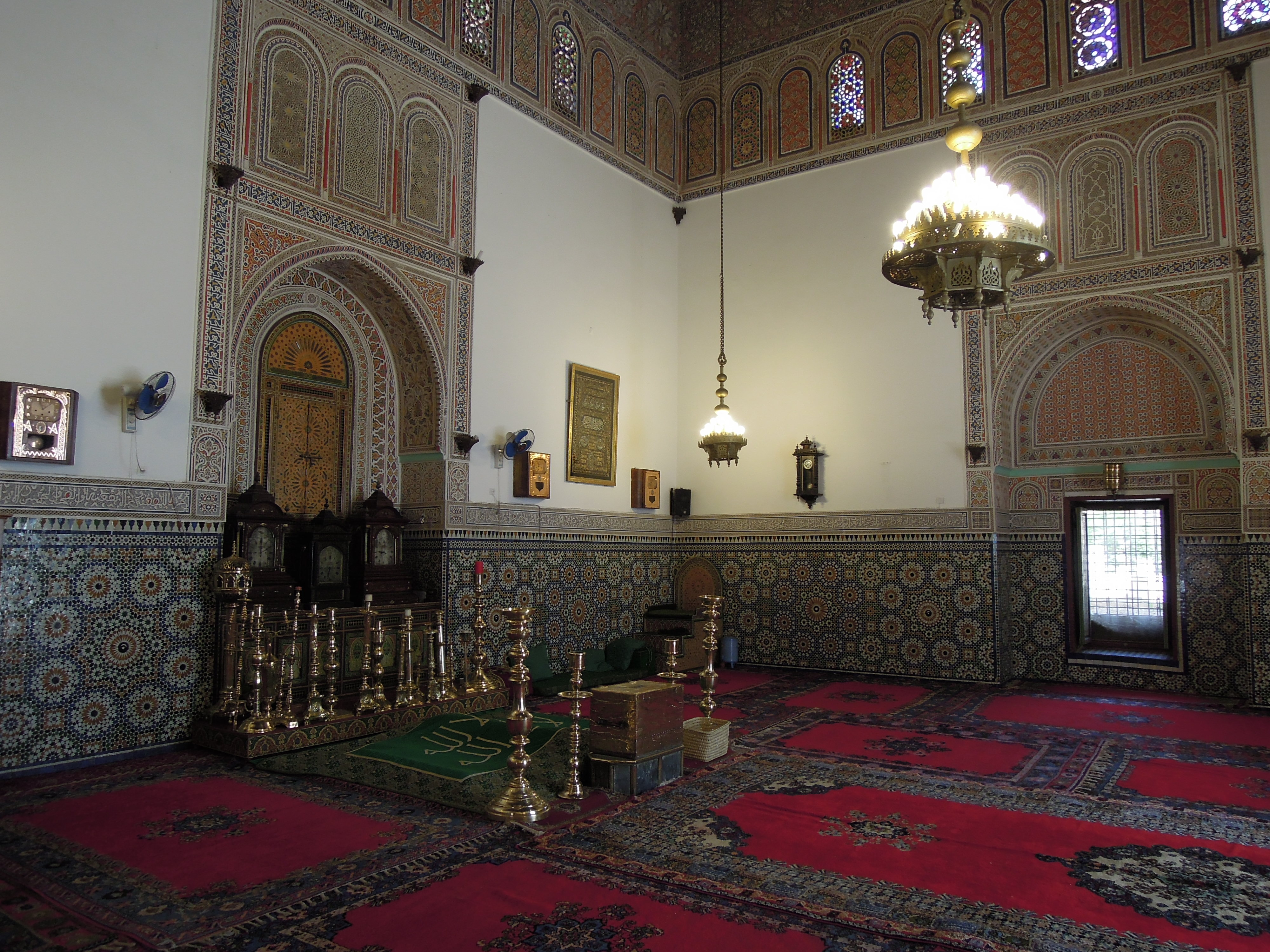 Vue intérieure du mausolée de la Zaouïa de Sidi Bel Abbès. La fenêtre en arrière-plan donne sur le cimetière jouxtant la Zaouïa.